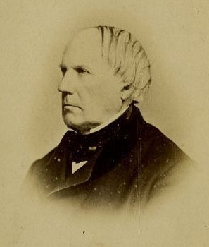 Edgar Quinet, photographie sur une carte de visite, Photographie Bertall & Compagnie, 33 rue Boissy d'Anglas (anciennement rue de la Madeleine), vers 1870.